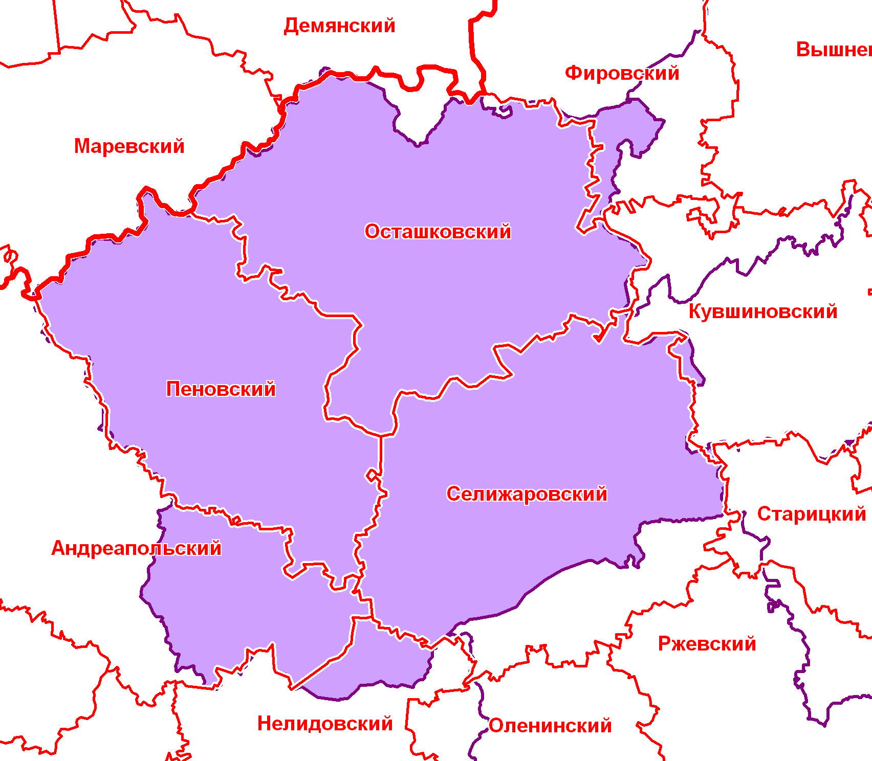 Осташковский уезд в современной сетке районов.